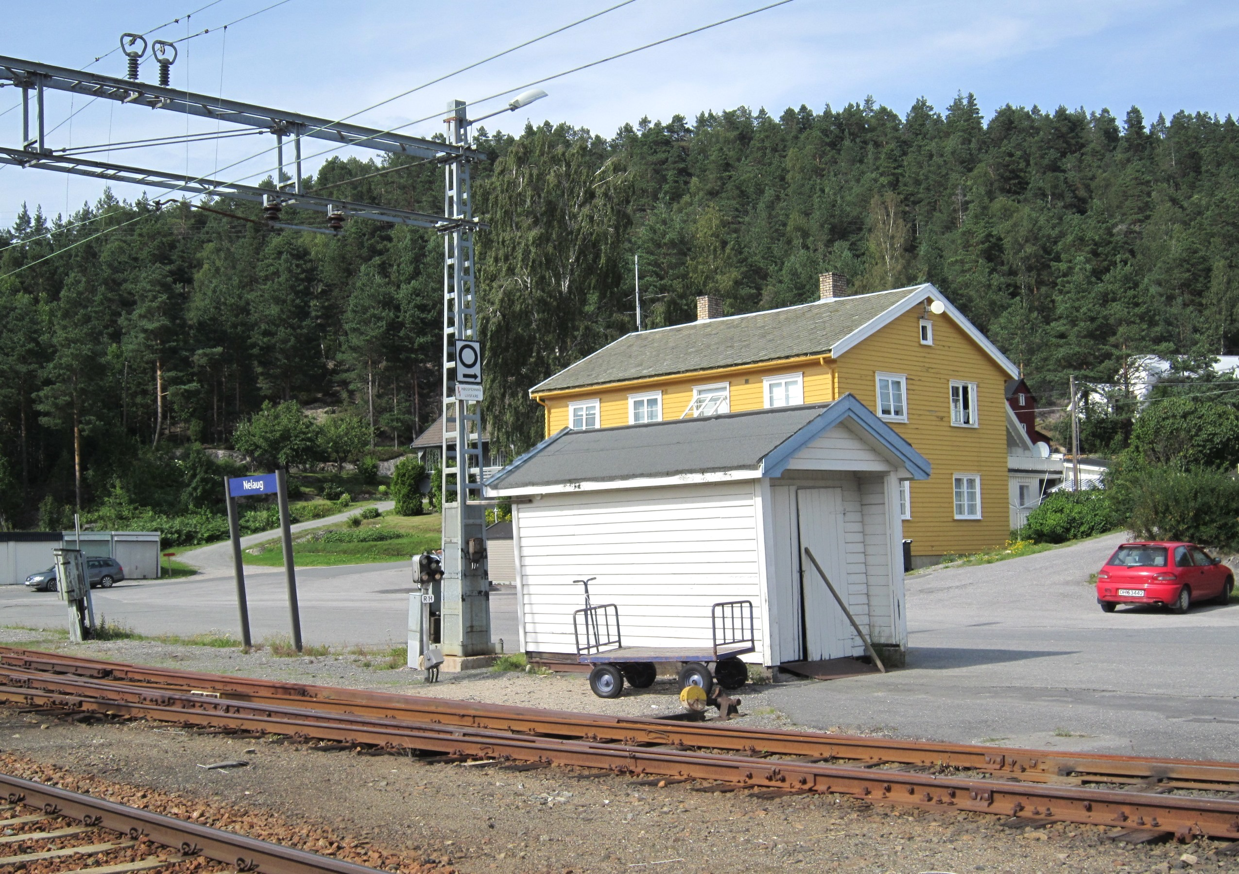 Fylkesvei 412 ender i vestkant av plattformen på Nelaug stasjon.